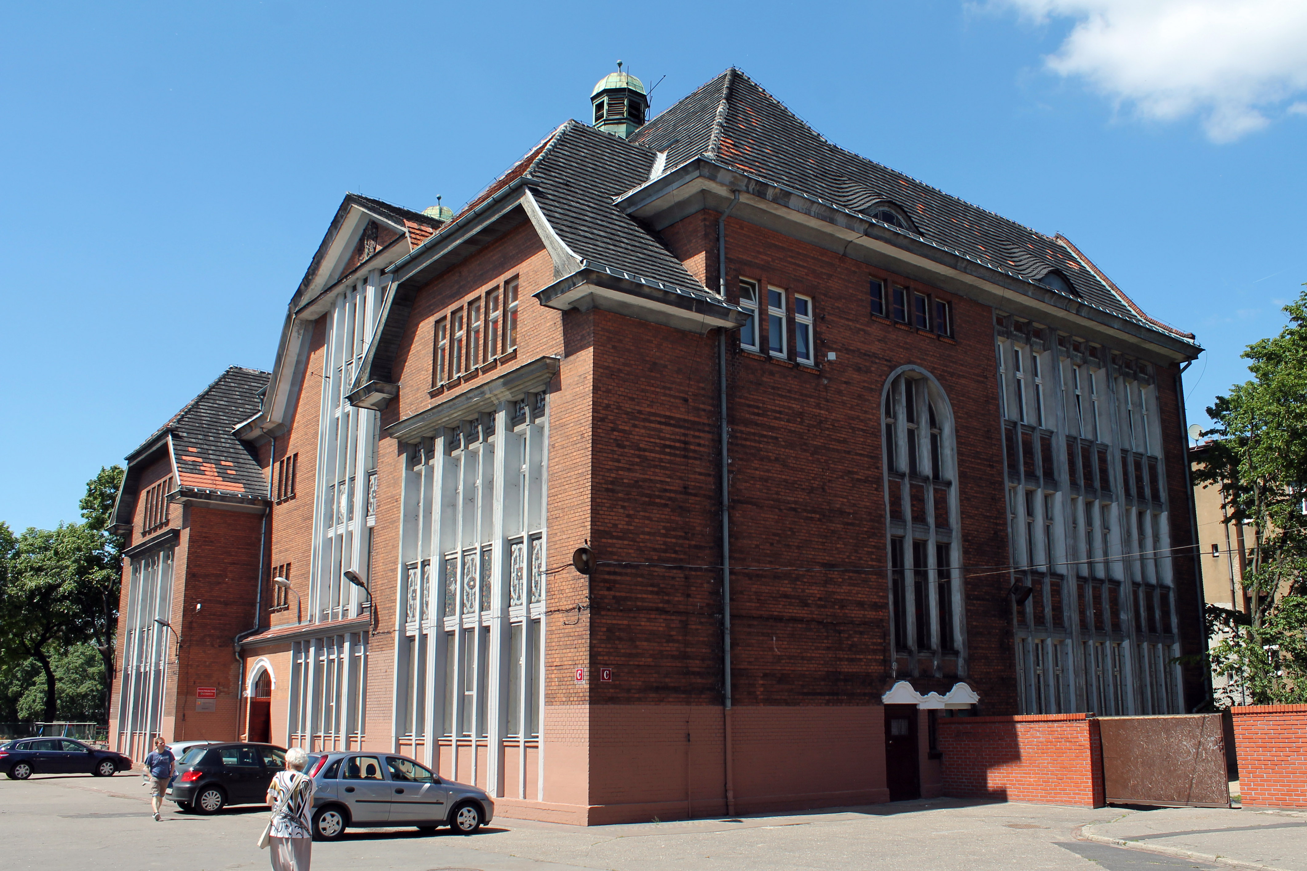 Zespół Szkół z Oddziałami Integracyjnymi i Specjalnymi nr 2: szkoła podstawowa nr 25 i gimnazjum nr 41, ulica Prądzyńskiego 53, Wilda, Poznań.